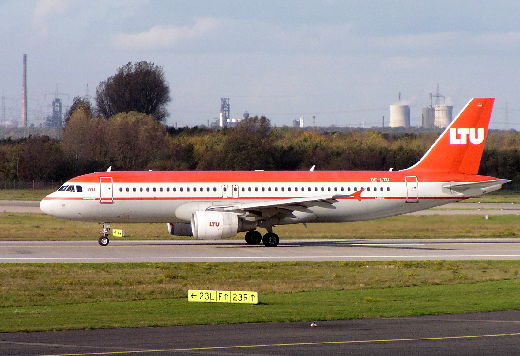 LTU-Austria A320-200 OE-LTU in Düsseldorf (EDDL)